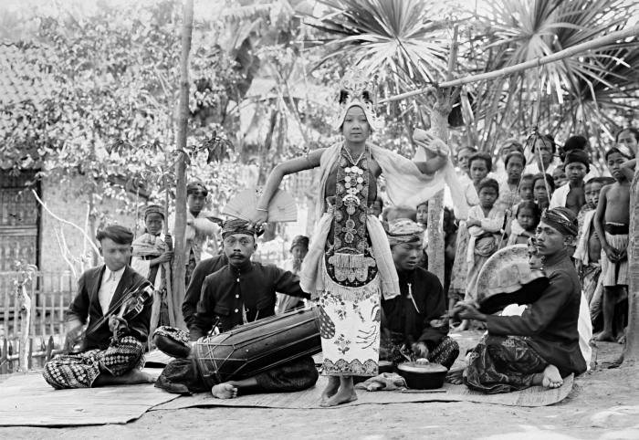 Negatief. Een gandrung banyuwangi danseres met muzikanten